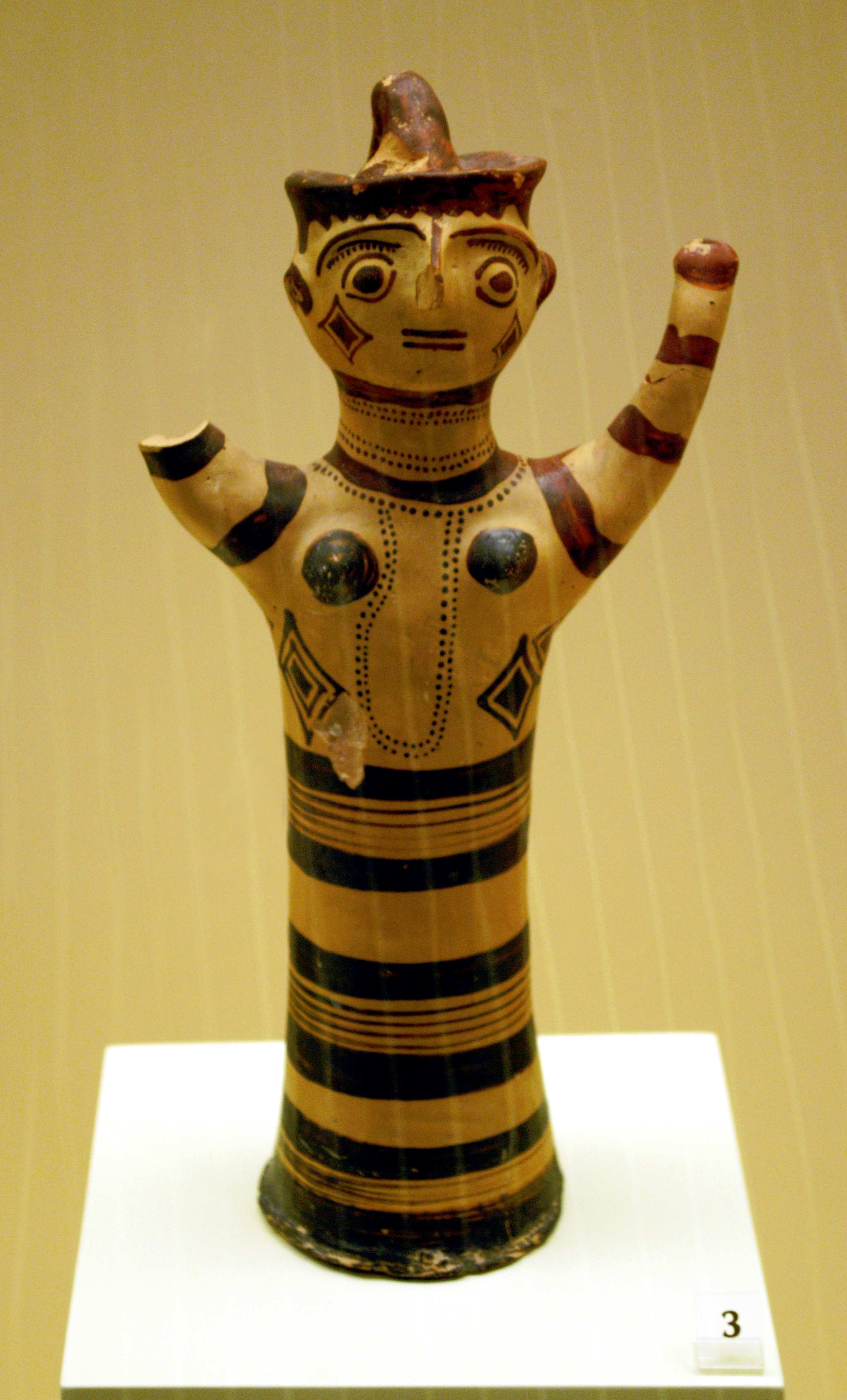 Idole mycénienne en terre cuite peinte, vers 1300-1200 av. J.-C.